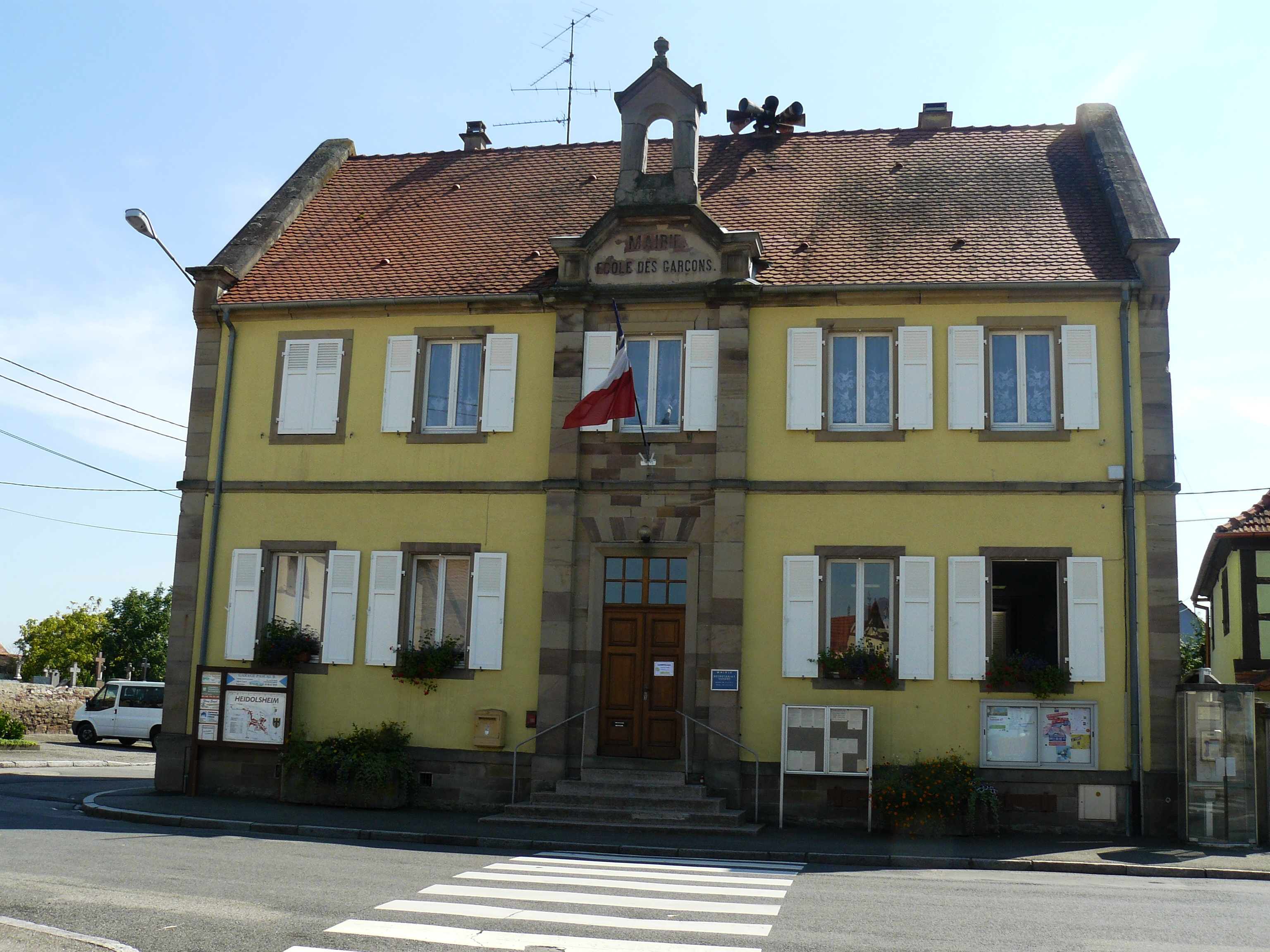 Mairie-école du village d'Heidolsheim